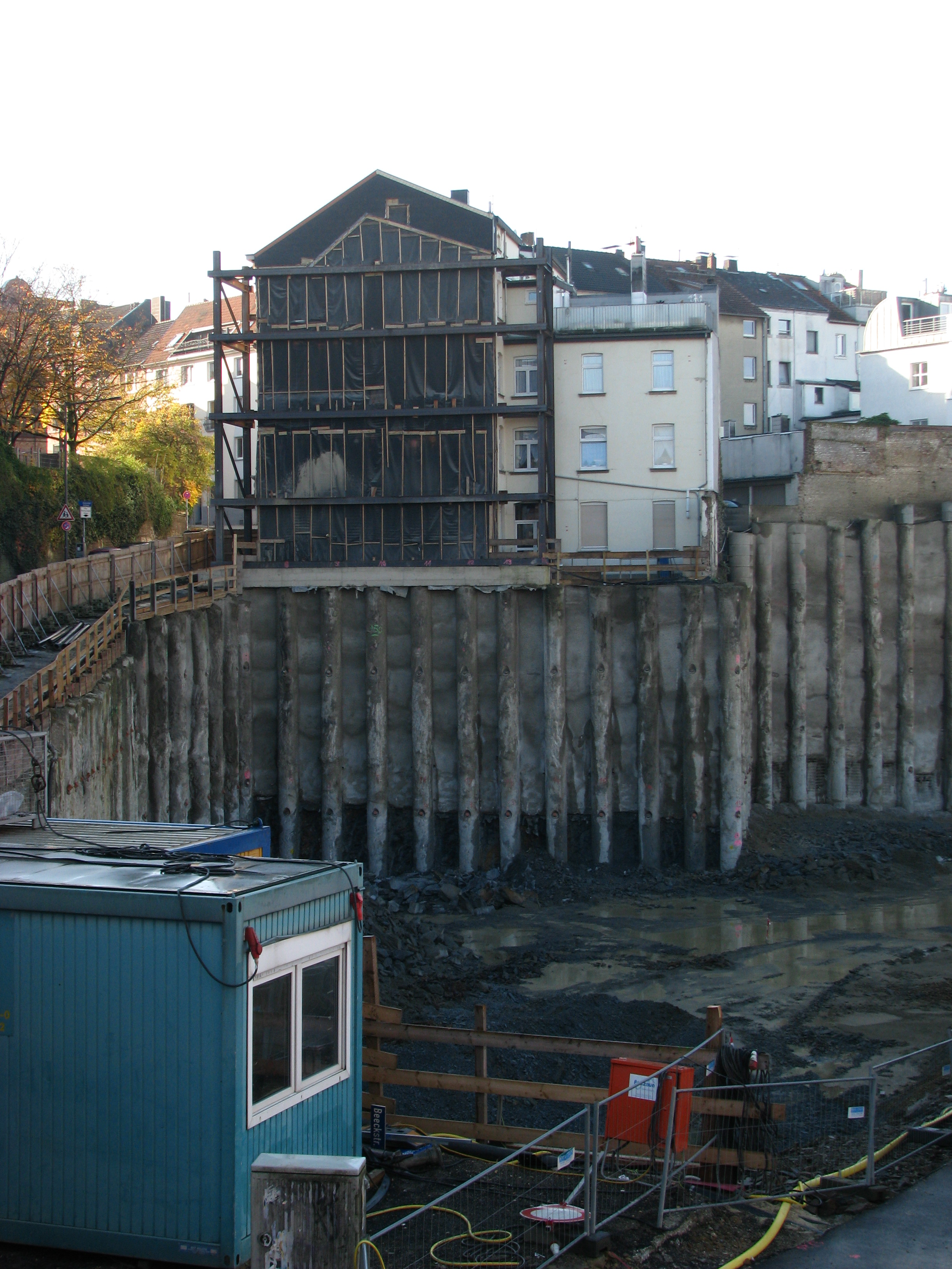 Haus am Abgrund - Baustelle des Einkaufszentrums Aquis Plaza am Kaiserplatz in Aachen am 13. November 2013.